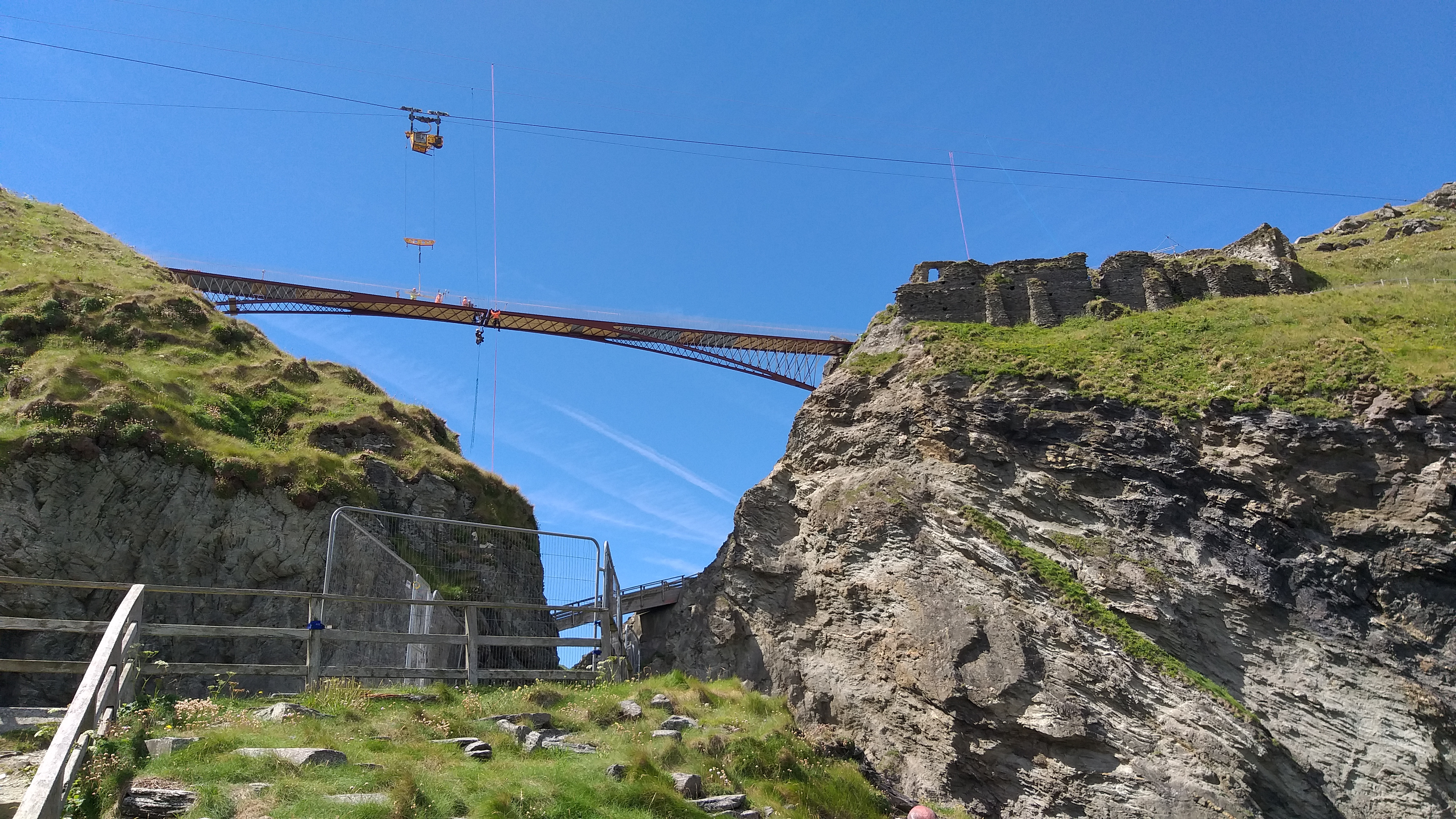 Die neue Fußgängerbrücke vom Festland zu dem auf einer Halbinsel gelegenen Tintagel Castle.